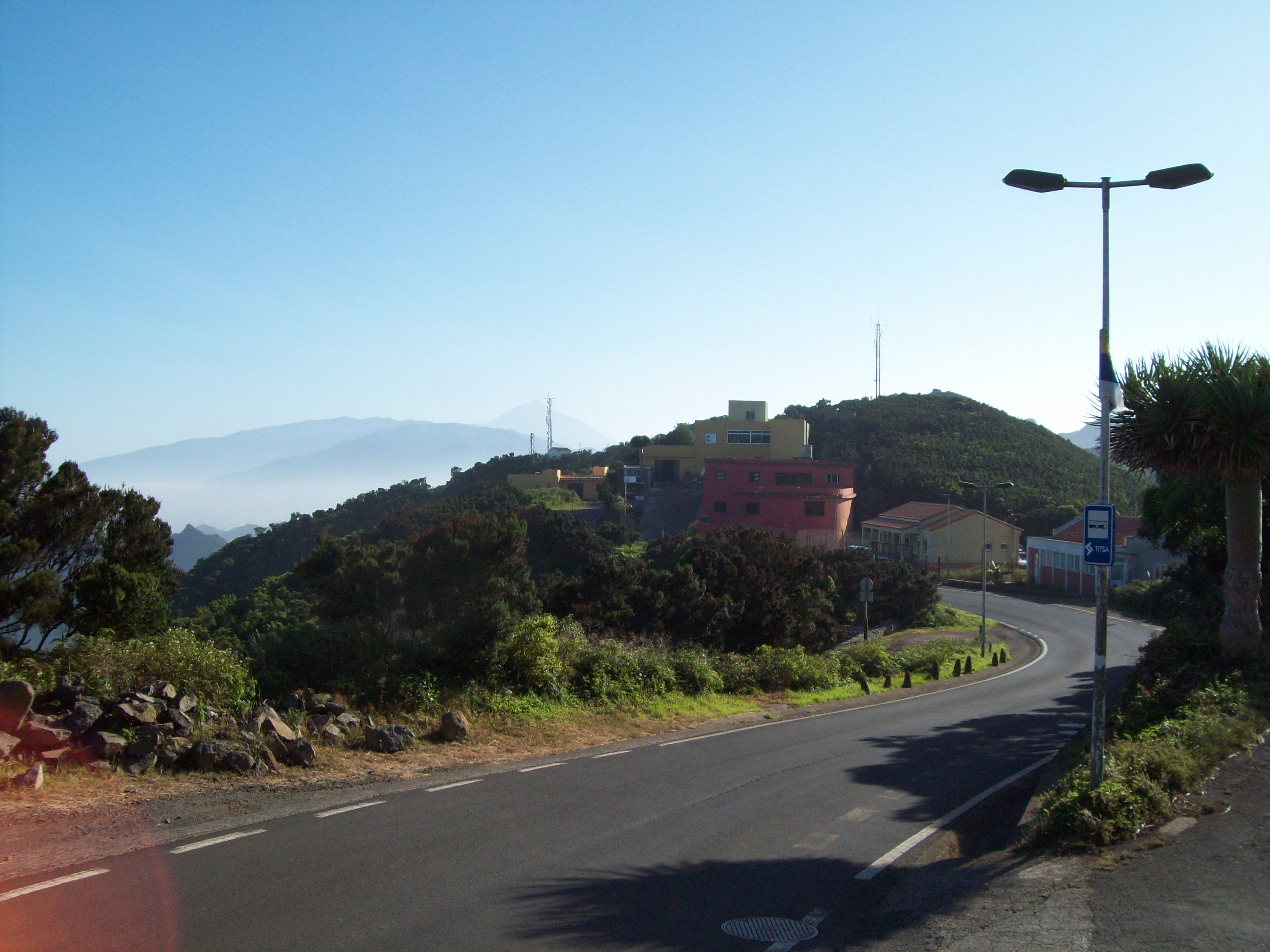 Imagen de Casas de La Cumbre, en Anaga (Tenerife).